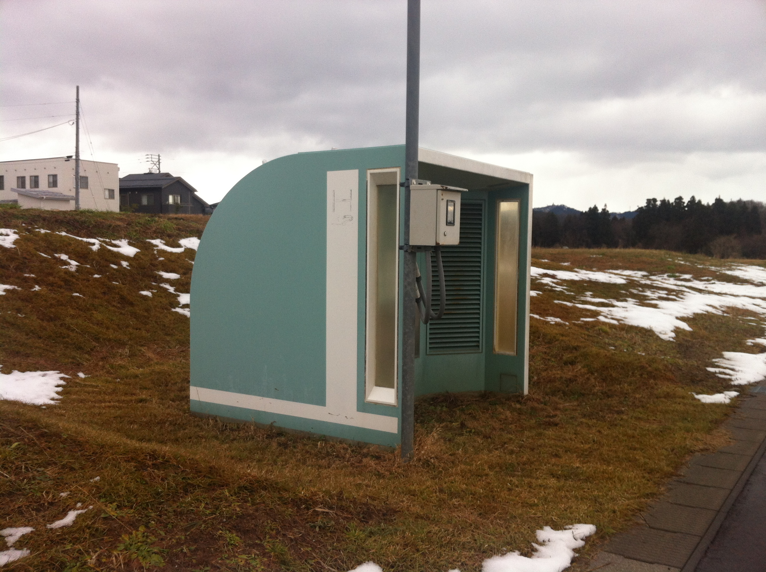 ゴミの投入口